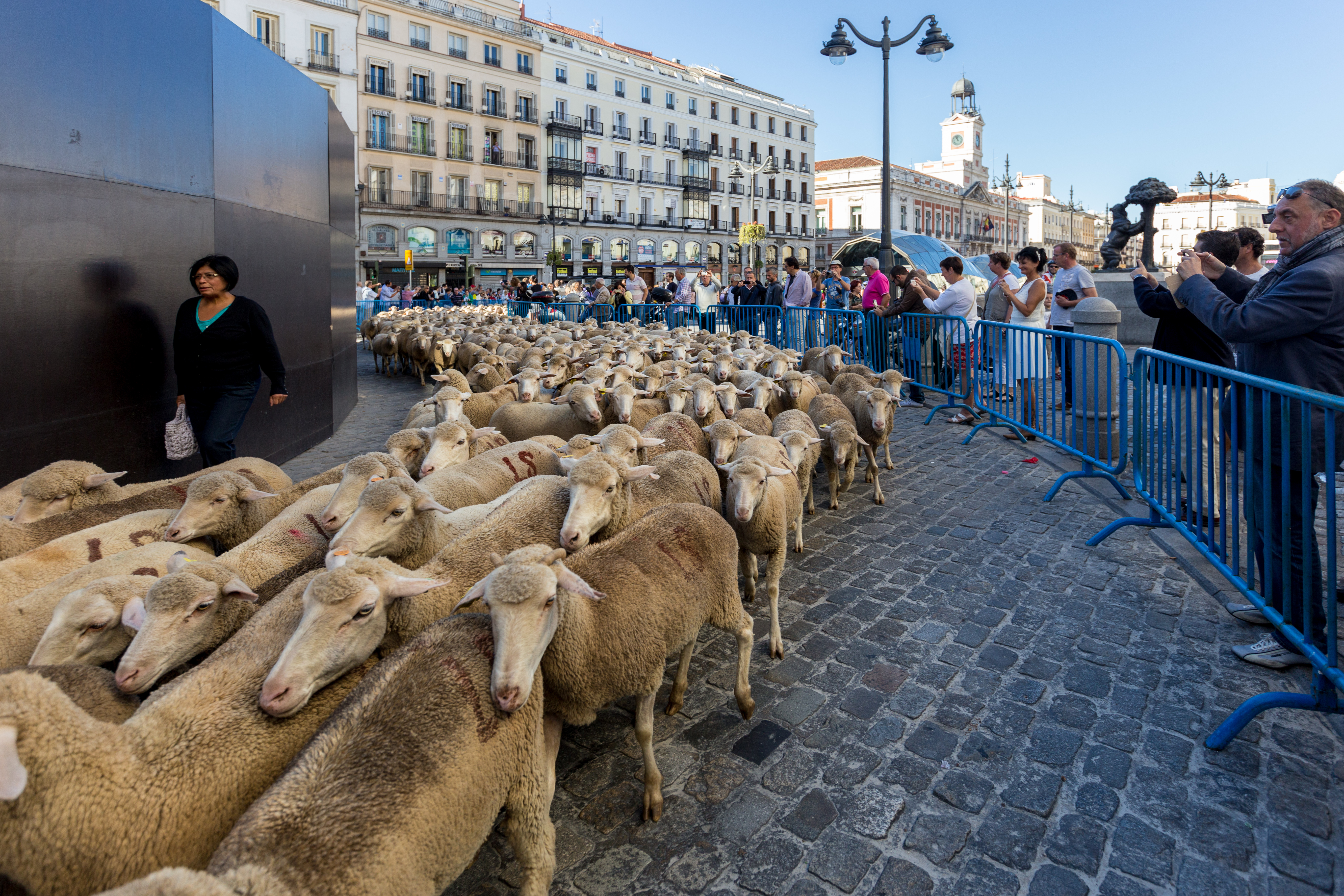 XX fiesta de la trashumancia, Madrid. El rebaño compuesto por 2000 ovejas transitando por la Puerta del Sol.